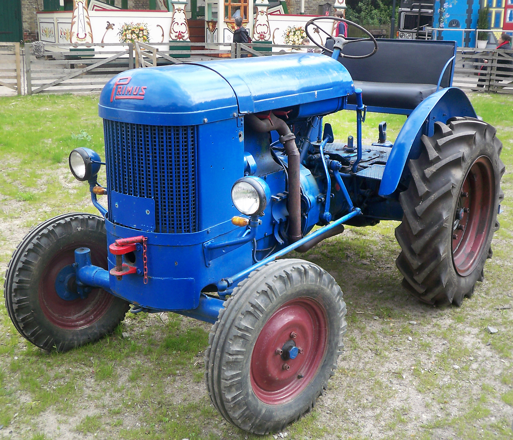 Restaurierter Primus P22-Traktor mit umgebautem Sitz auf der Domäne Dahlem, Berlin.